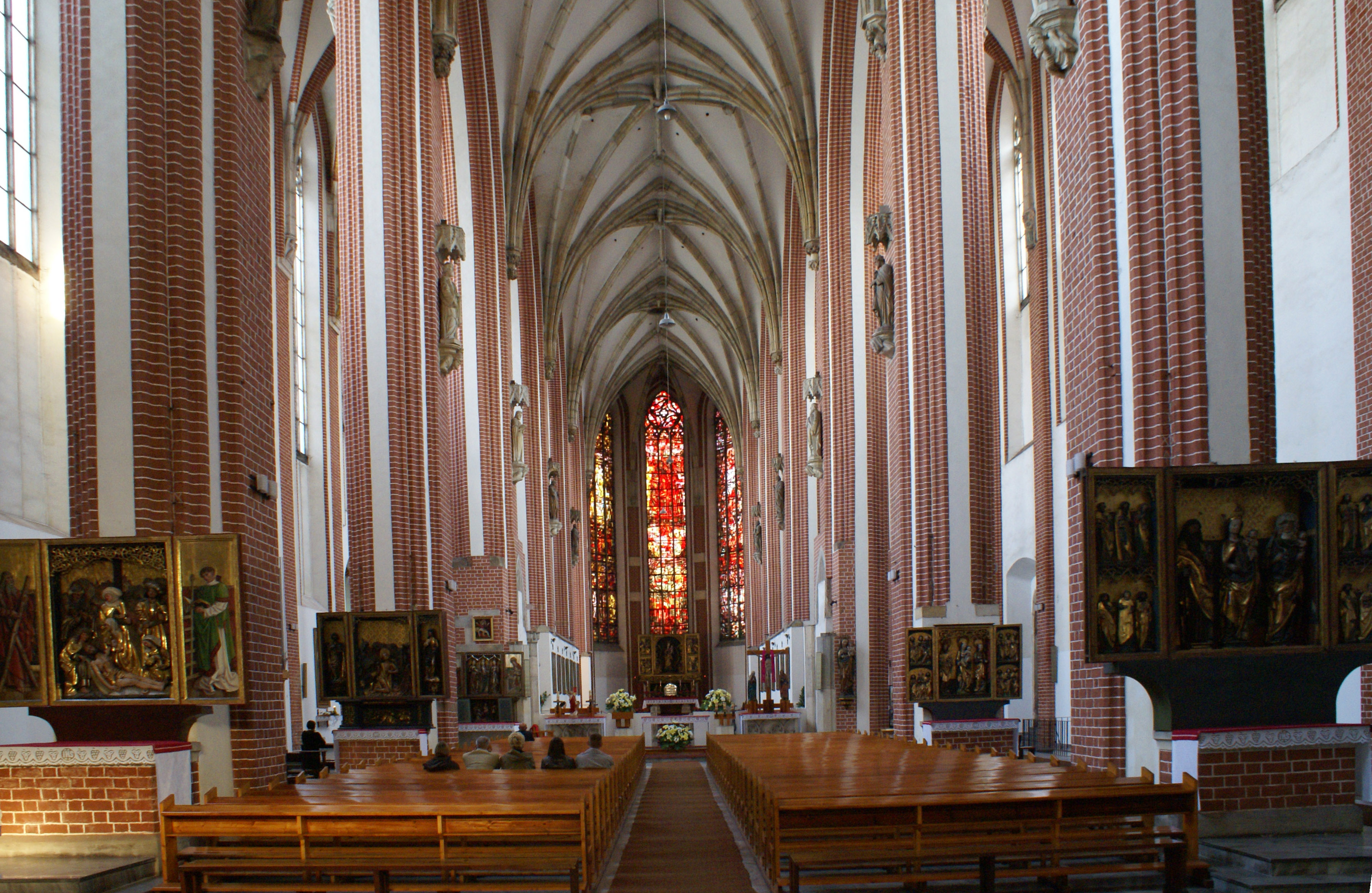 Kościół parafialny NM Panny „Na Piasku” , d. klasztorny św. Jadwigi, Miasto Wrocław - Śródmieście